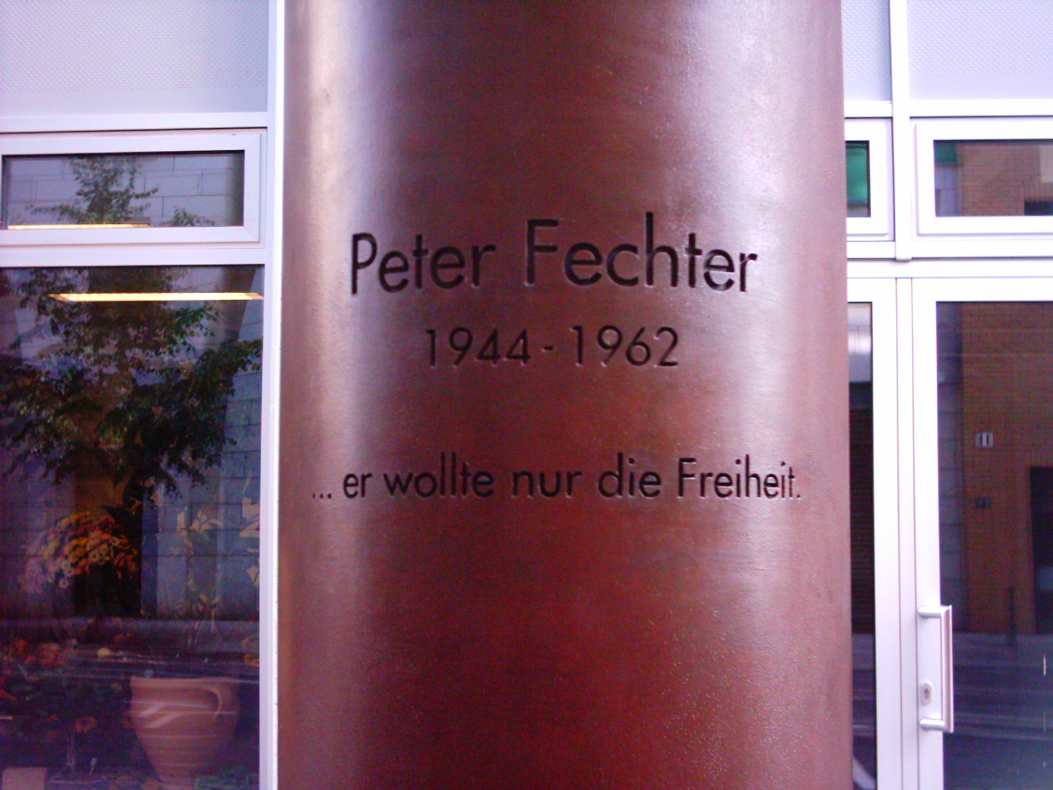 Fechter Mahnmal (Nahvorderansicht) in der Nähe des Checkpoint Charlie vom 19.06.2005 Fotograf: Jens Lordan Dateistatus: GNU FDL